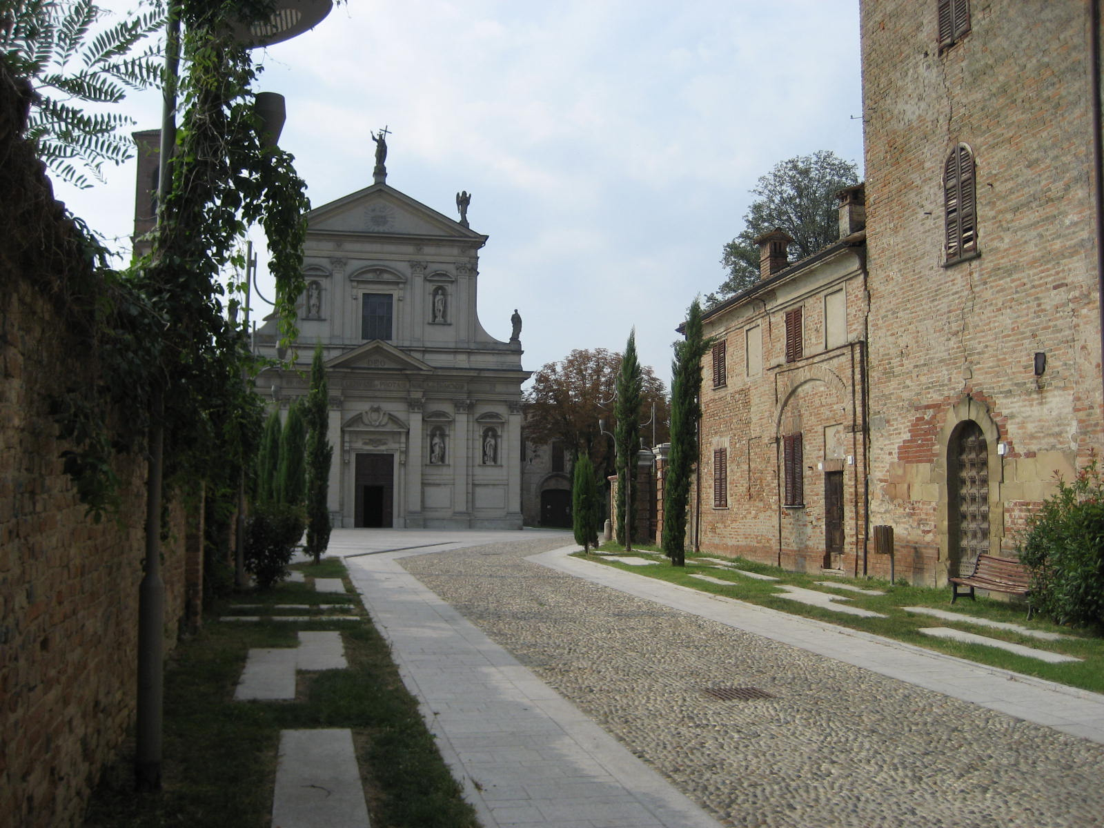 Montebello della Battaglia,la Chiesa dei Santi Gervasio e Protasio e (a destra) la torre medievale dei Beccaria.